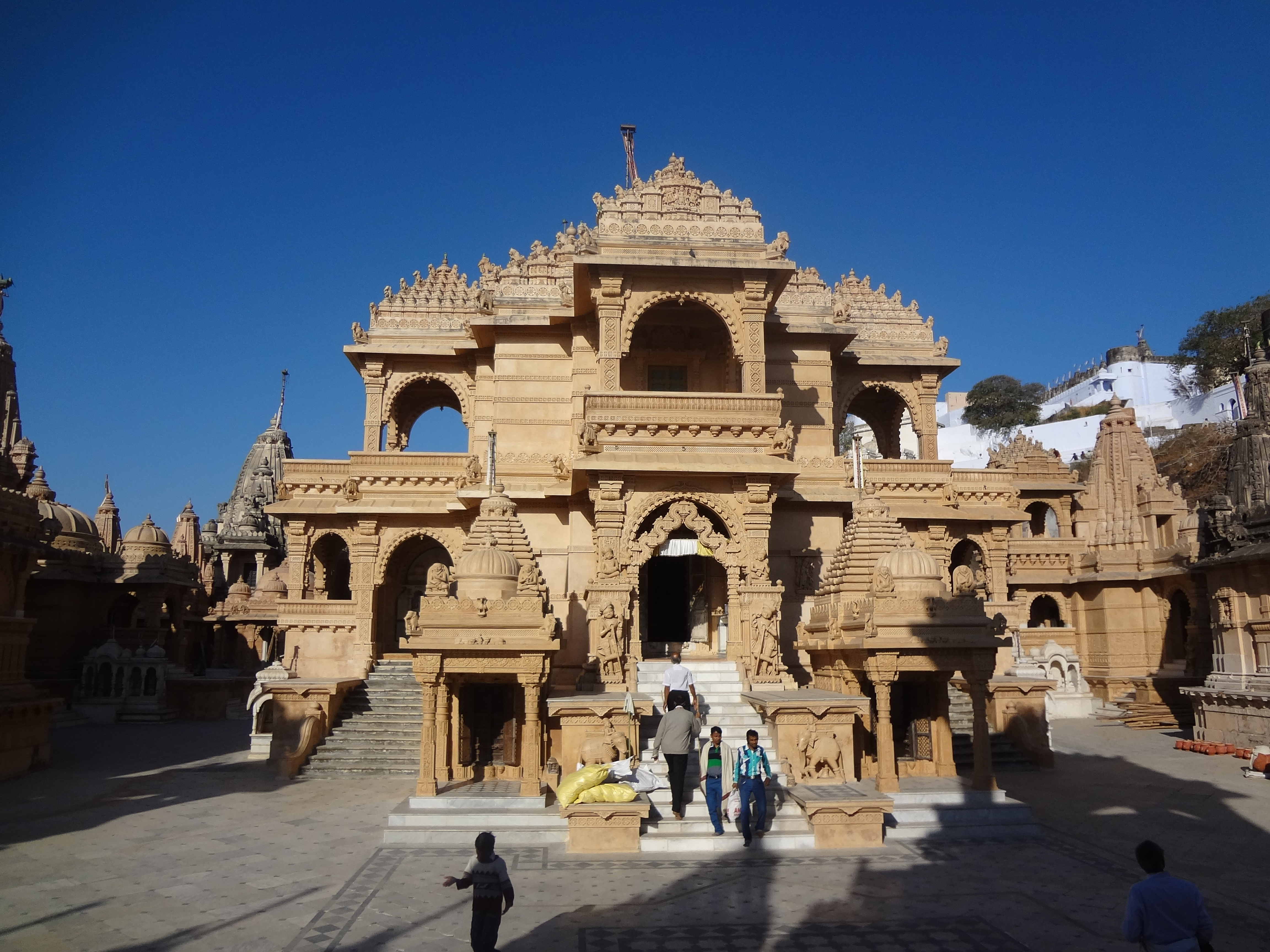 Palitanas glory